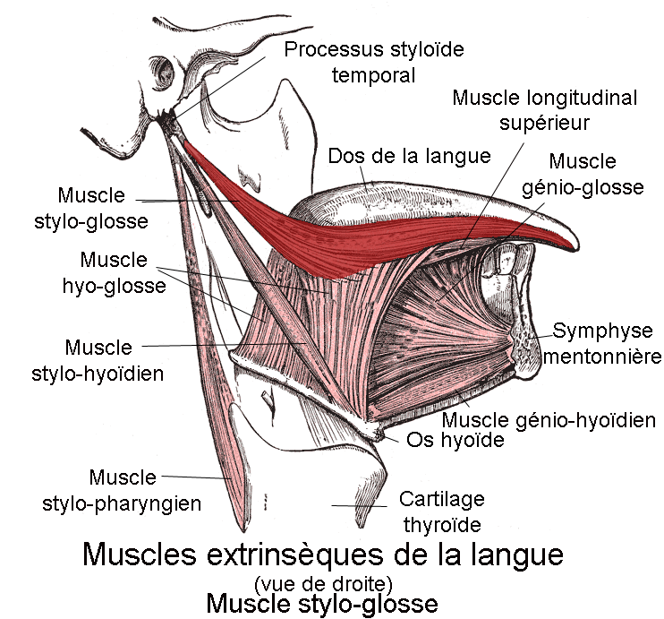 Muscle stylo-glosse. Vue latérale droite. Anatomie humaine